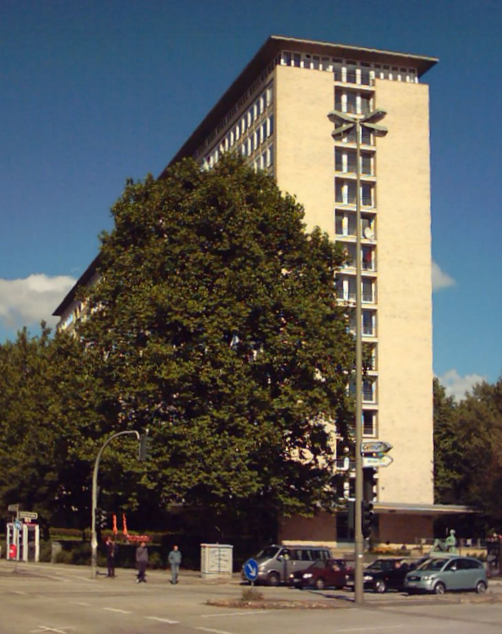 Eines der Hamburger Grindelhochhäuser an der Ecke Hallerstrasse/Grindelberg correct deformation and rotation, selection of Image:Grindelhochhaus1.poupou.jpg